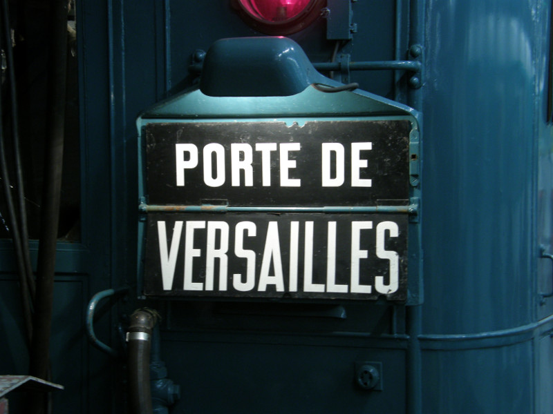 Destination Porte de Versailles sur un Sprague-Thomson Nord-Sud .